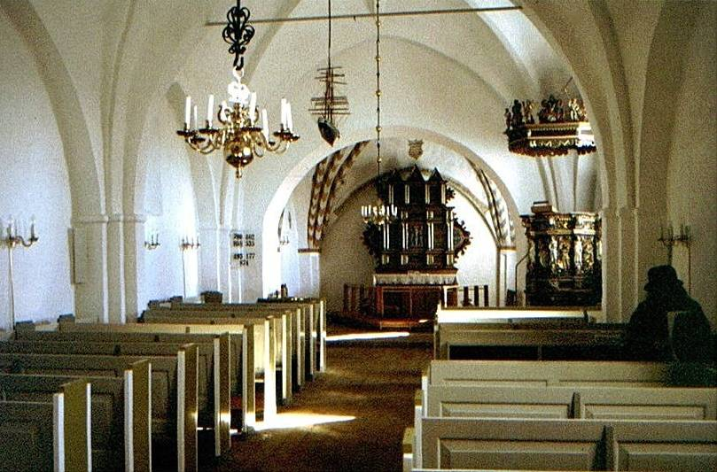 Balle Kirke, kirkerummet set mod oest